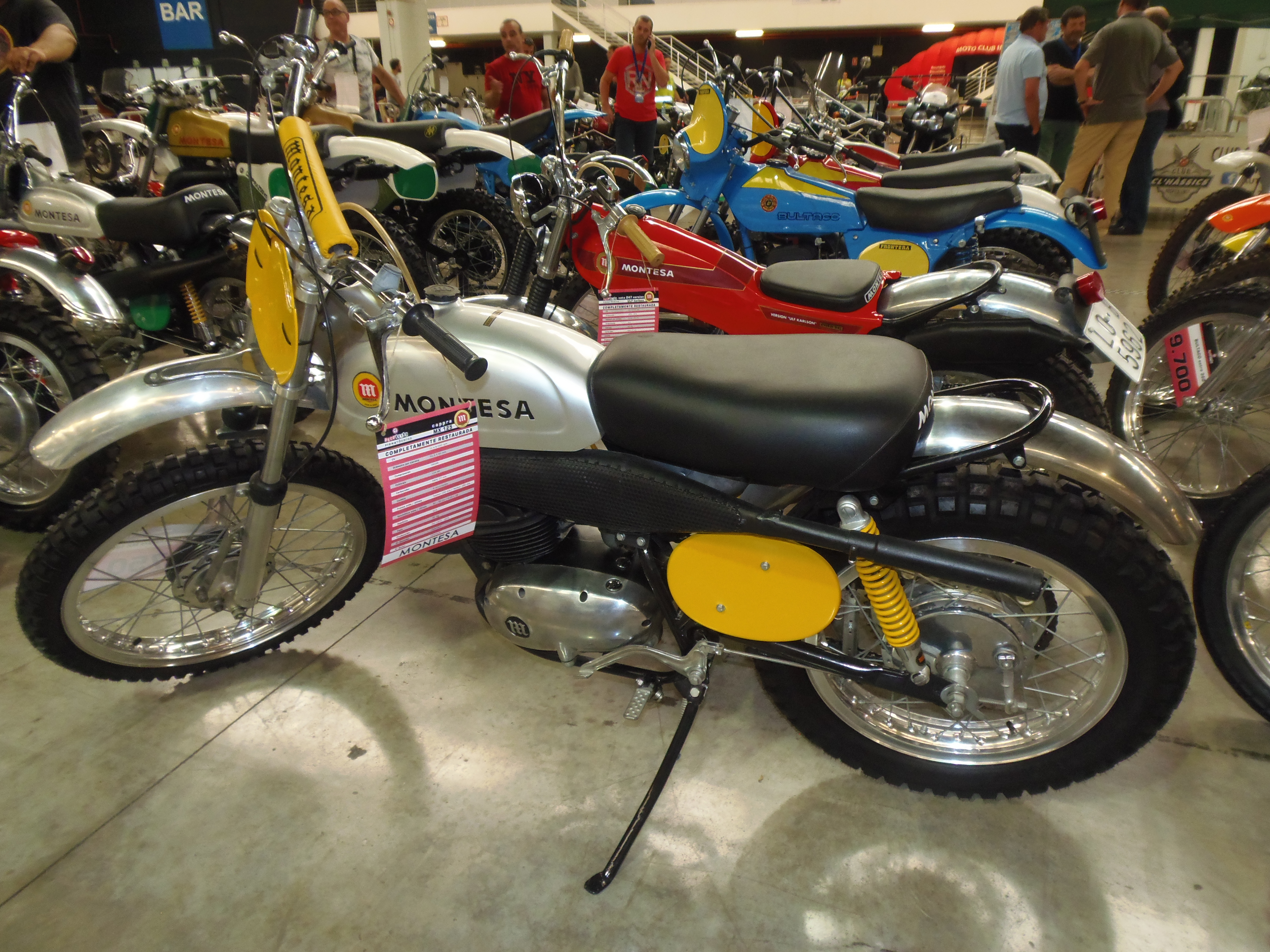 Montesa Cappra MX 125, 1970